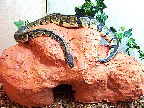 Königsphyton im Terrarium, auf Stein.